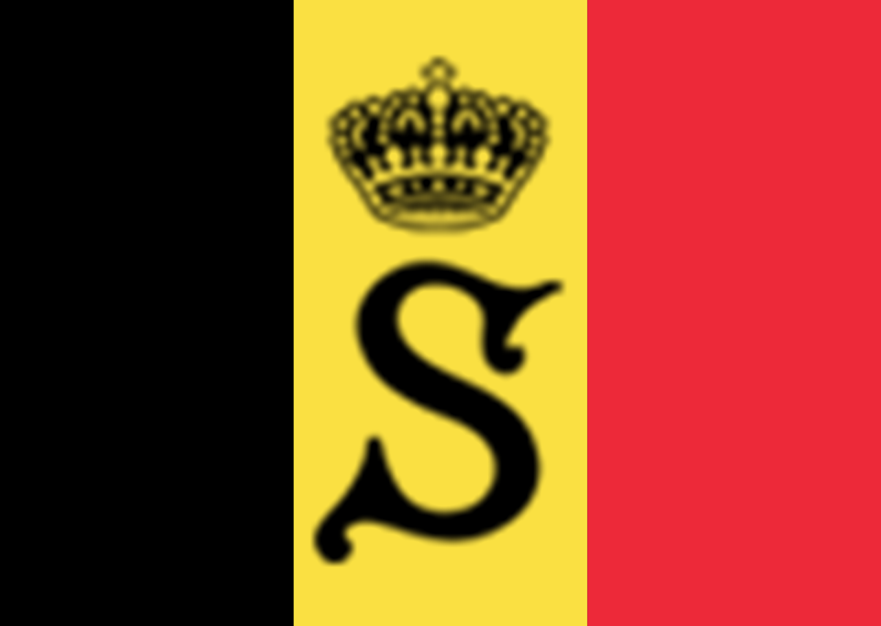 Logo du senat de Belgique sur fond de drapeau Belge